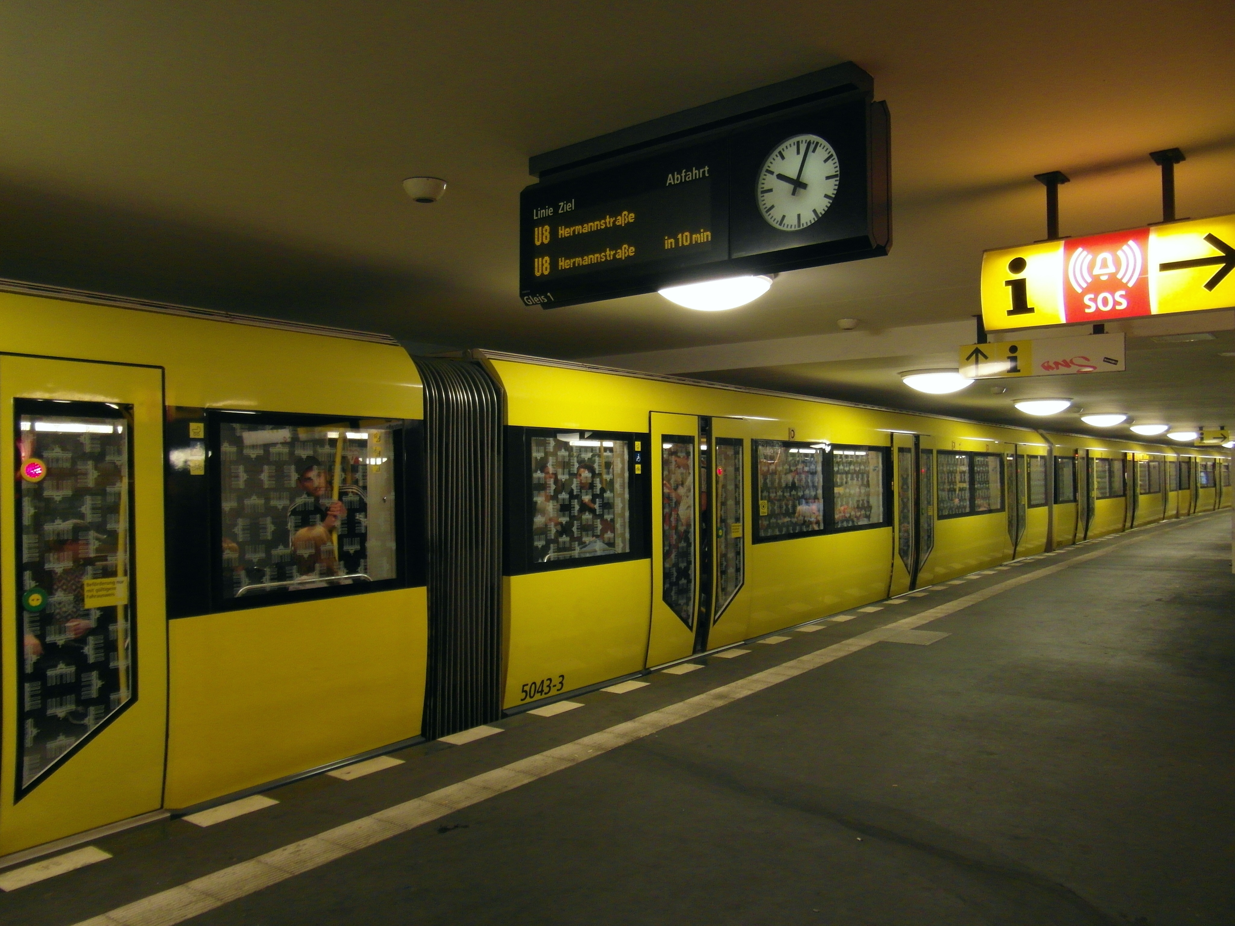 Linie U8